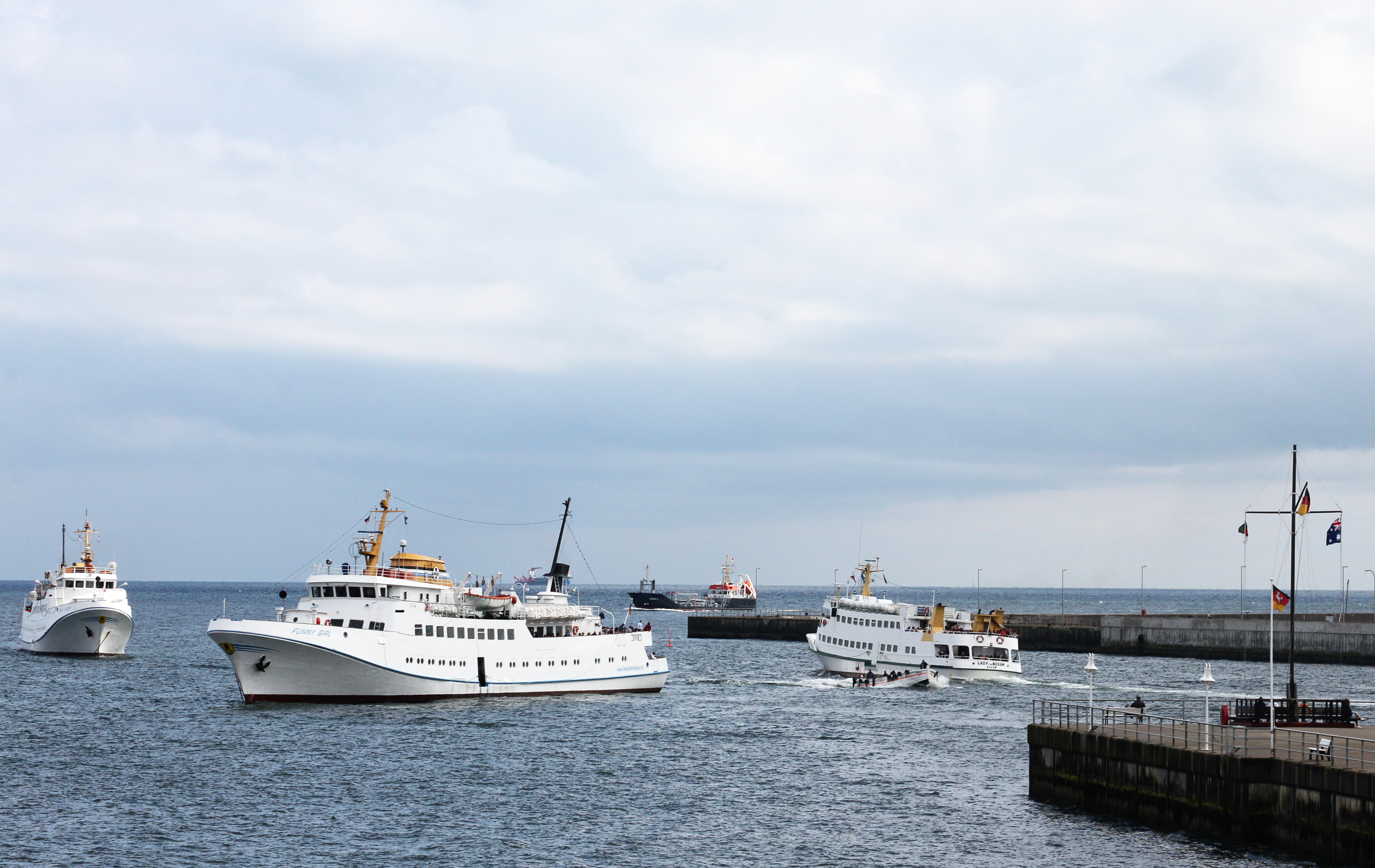 Helgoland; Börtebootregatta